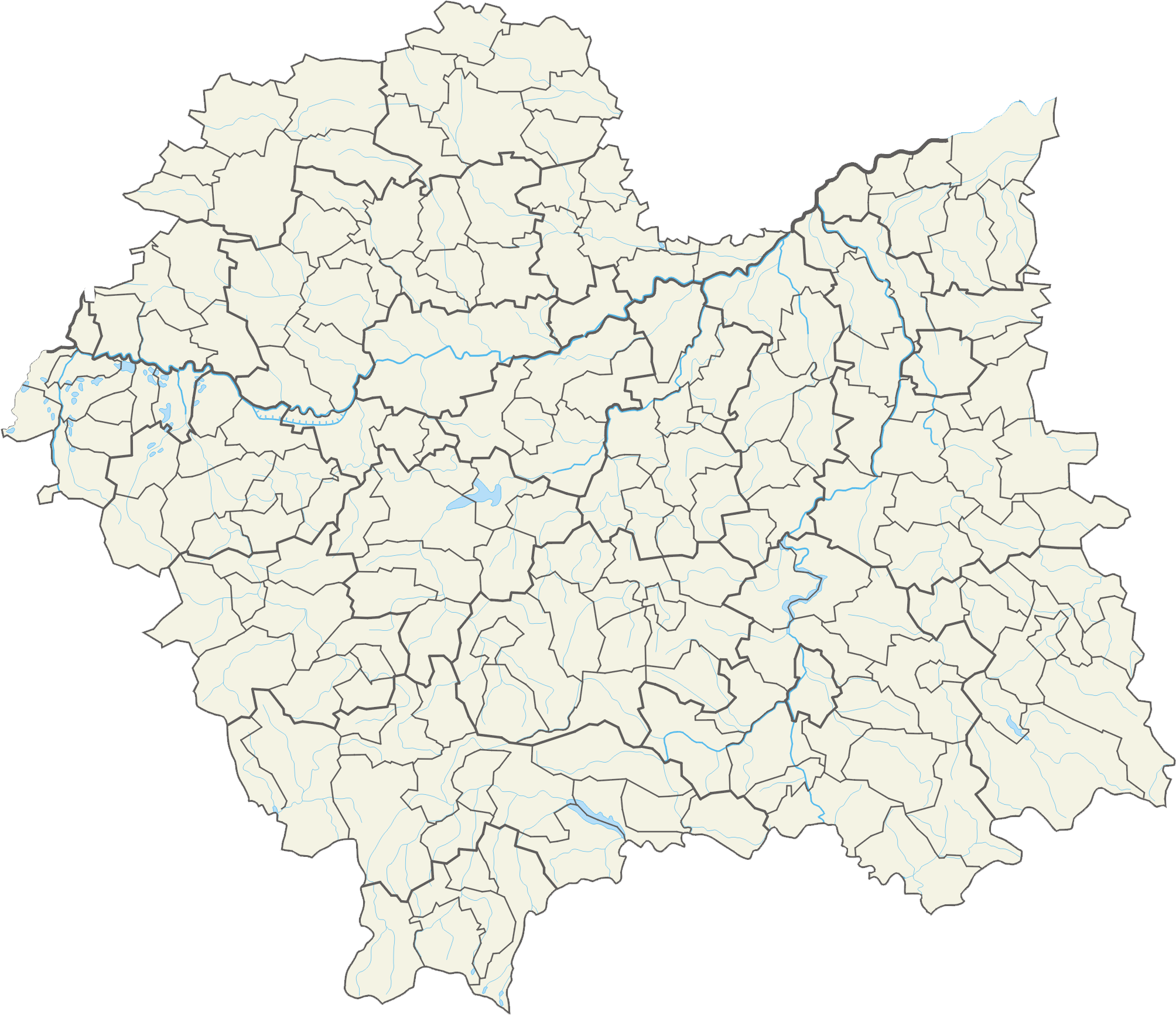 Województwo małopolskie – powiaty i gminy Współrzędne graniczne mapy: N: 50.5205° N S: 49.1785° N W: 19.0832° E E: 21.4219° E